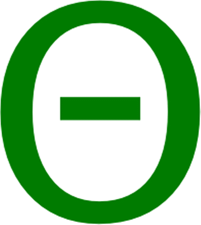 Earth day symbol